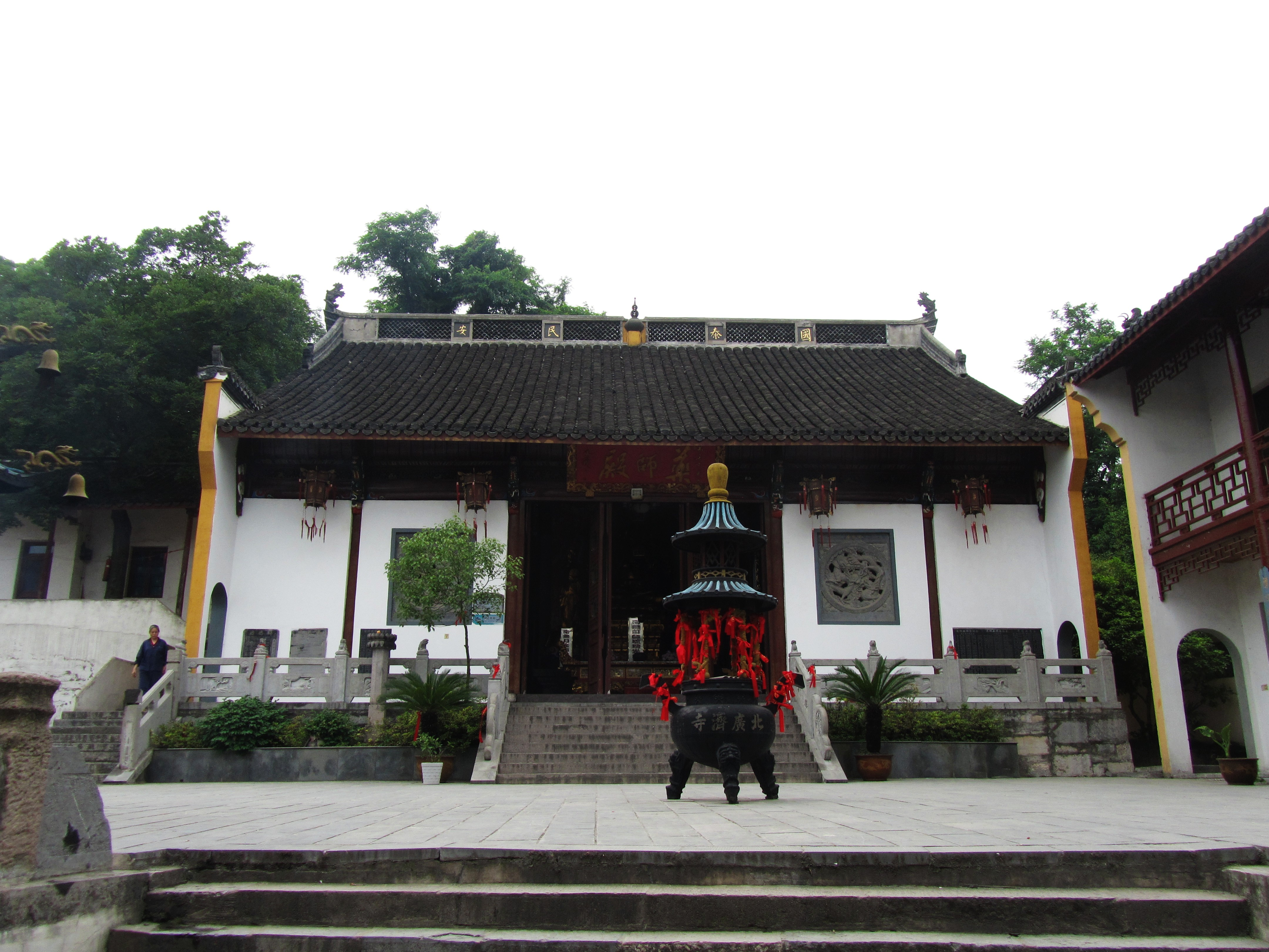 芜湖广济寺，药师殿。